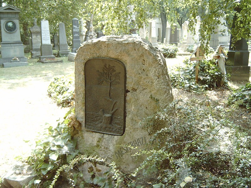 Mesterházi Lajos sírja Budapesten. Kerepesi temető: 34/2-1-34.